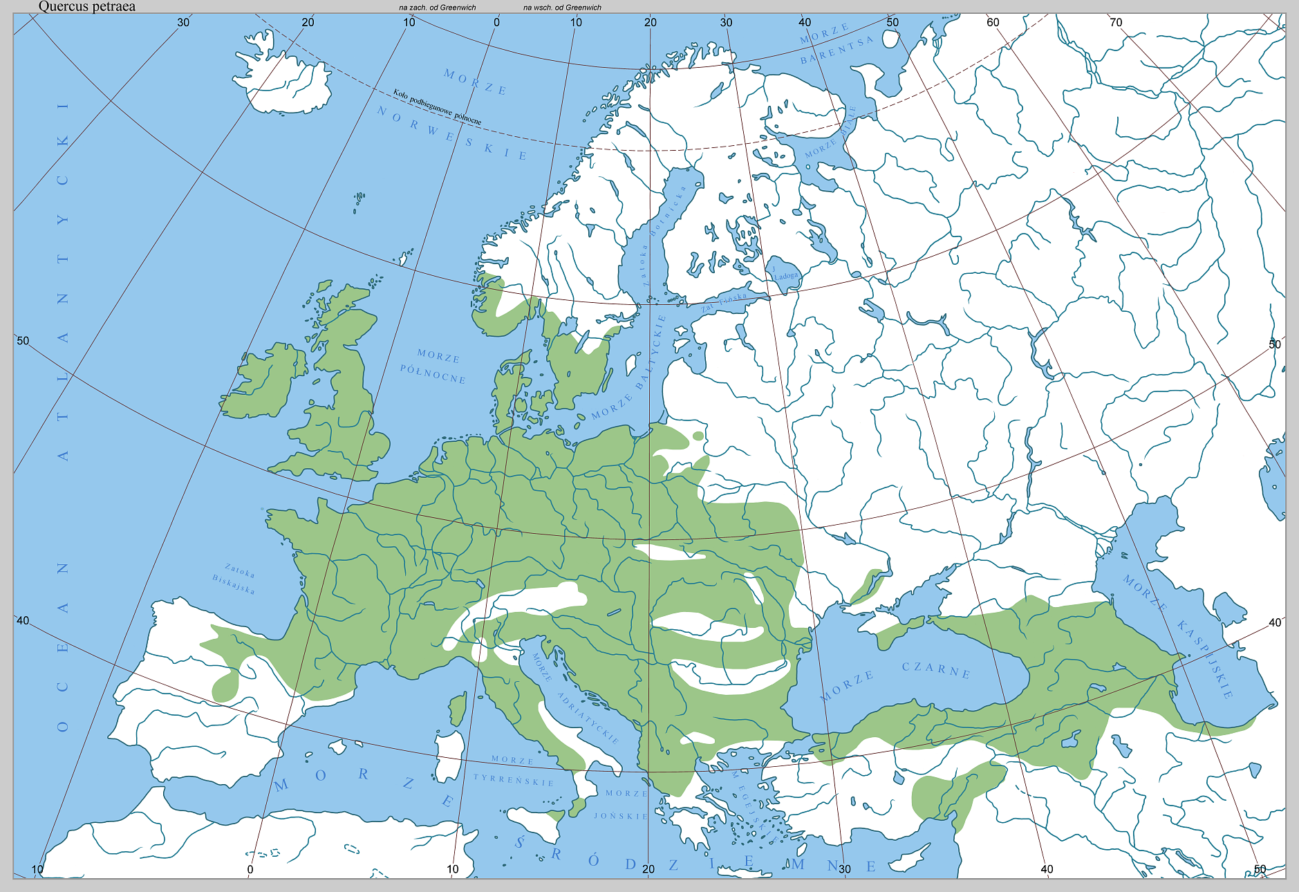 Zasięg dębu bezszypułkowego. Wykonane w maju 2005 przez Borcha3kawki na podstawie mapki zamieszczonej w artykule Adama Boratyńskiego 1995r.